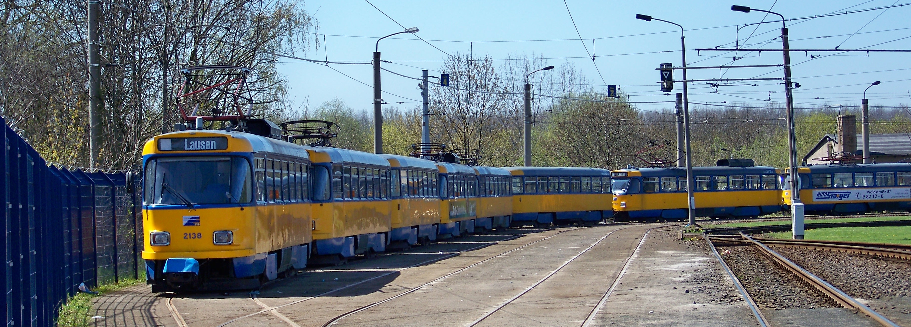 Abstellanlage der Leipziger Verkehrsbetriebe an der Endstelle Lausen mit Tatra T4DM-Großzügen